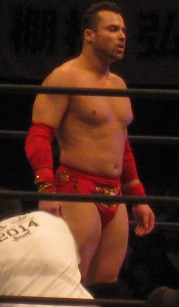 2013年11月9日 大阪府立体育会館 「POWER STRUGGLE」 アレックス・コズロフ